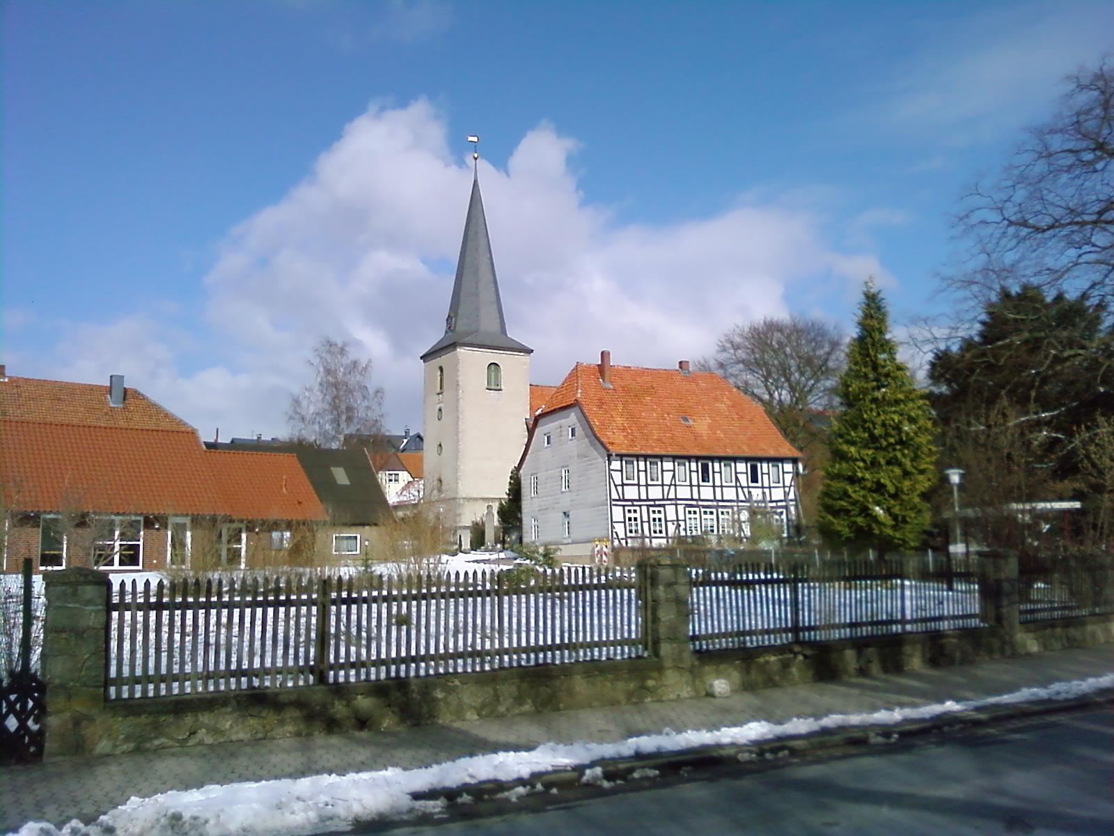 Despetal, Ortsteil Barfelde